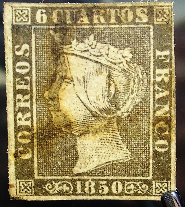 Primer sello de España